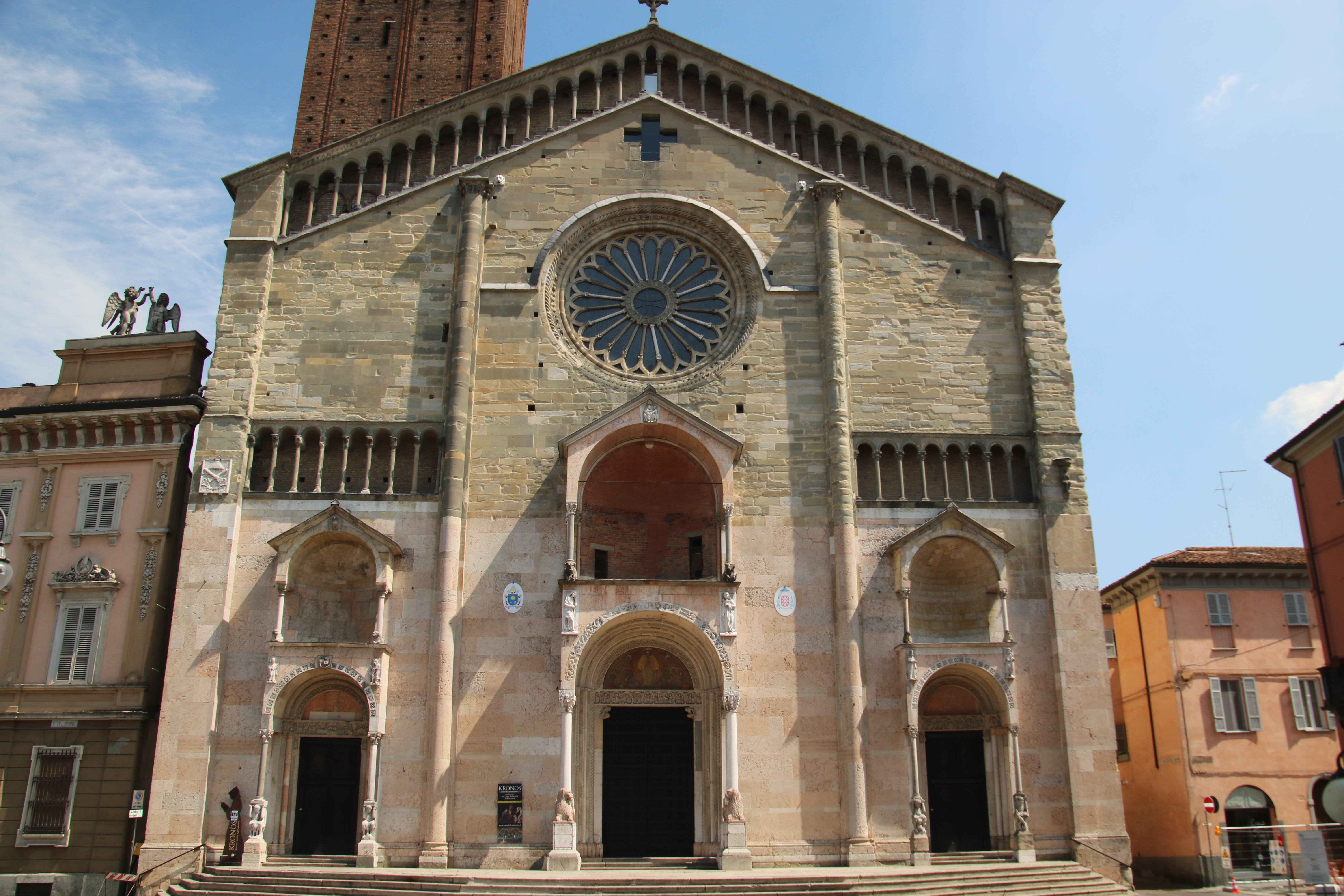 duomo di Piacenza This is a photo of a monument which is part of cultural heritage of Italy.